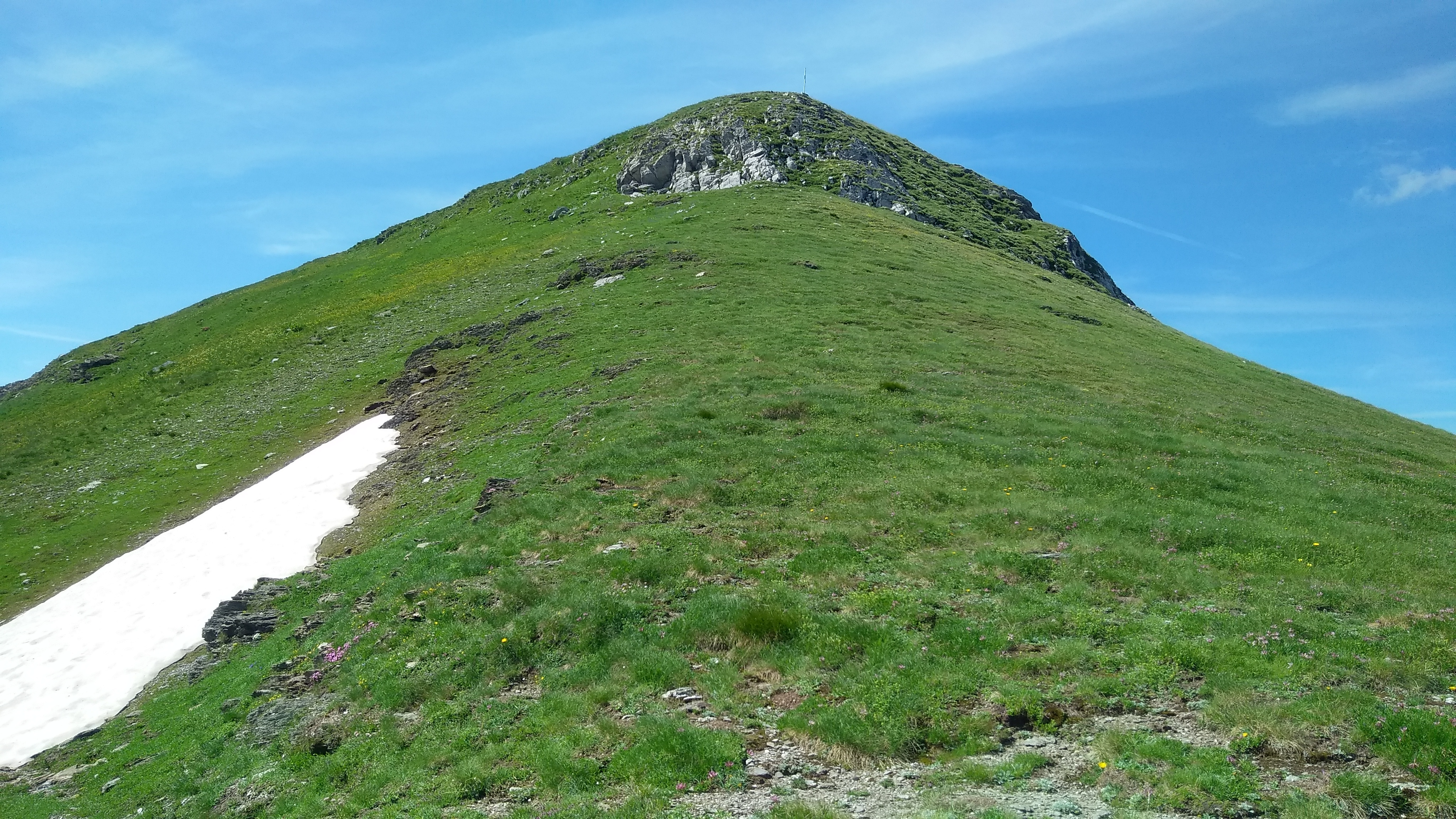 Cima della Fascia (Alpi Liguri): la sommità della montagna vista dalla spalla nord